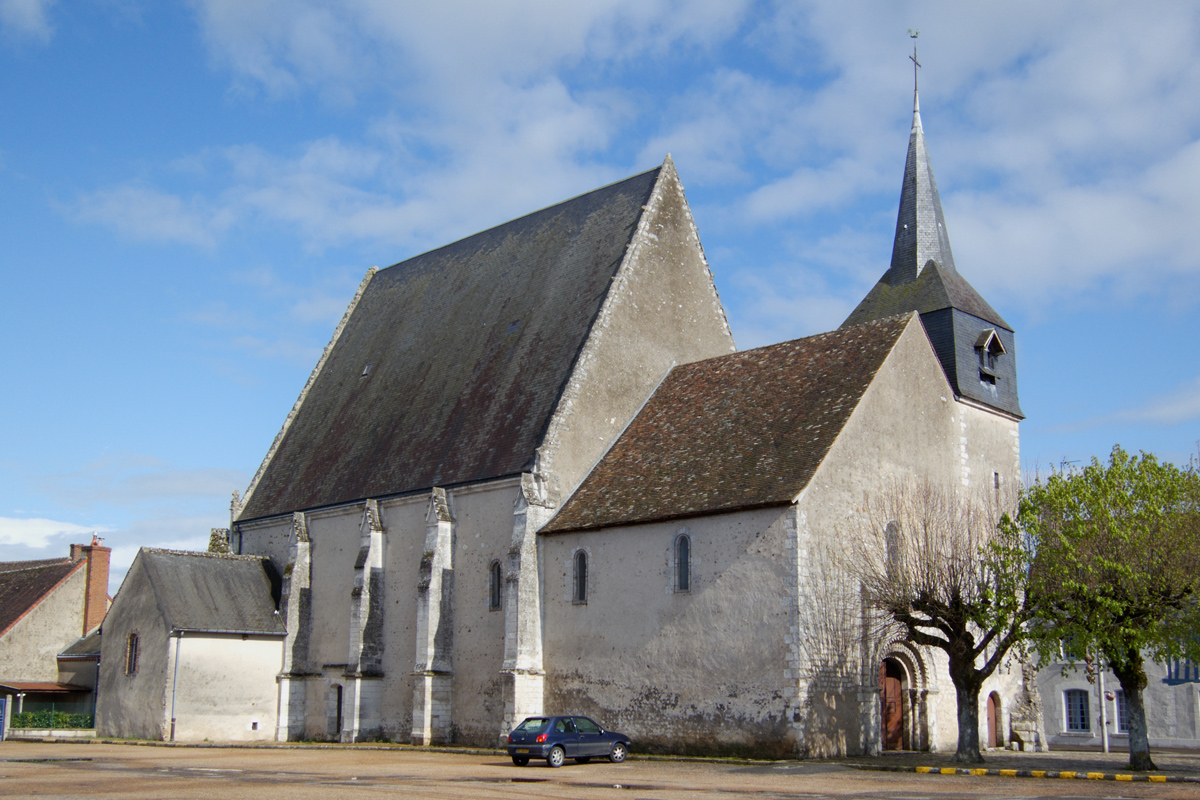 Eglise Saint Pierre à Pezou